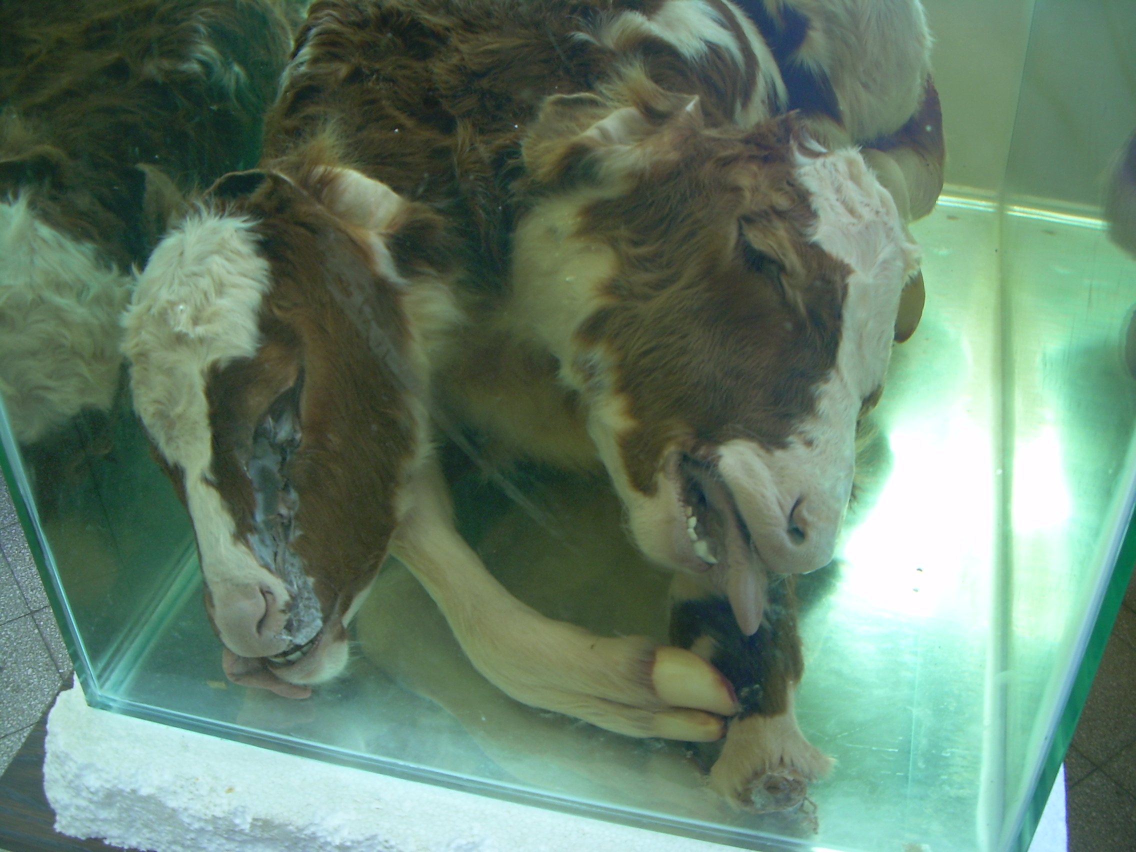 פרה דו ראשית משומרת בפורמלדהיד